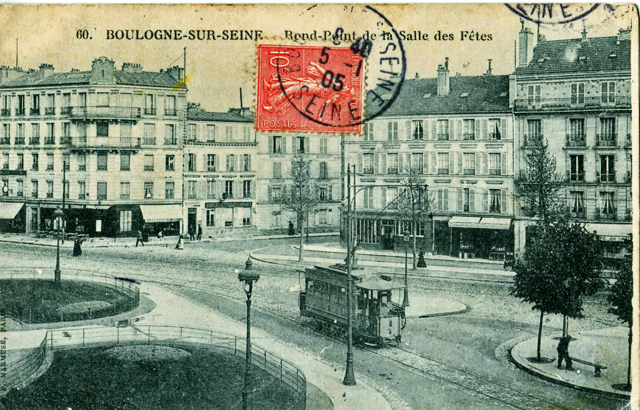 Carte postale ancienne éditée par Marmuse à Paris :BOULOGNE - Rond-Point de la Salle des Fêtes